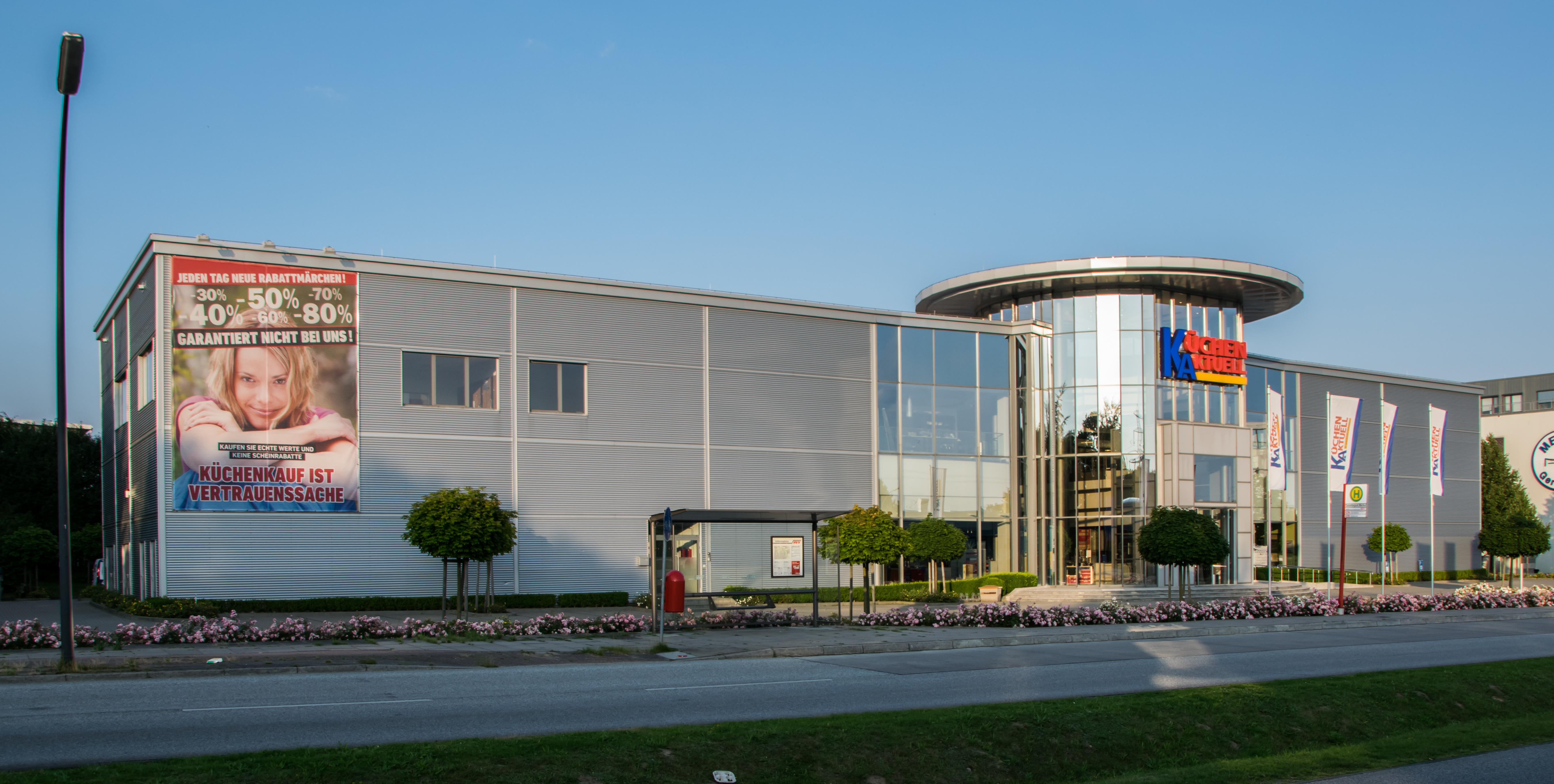 Küchen Aktuell Hamburg-Rahlstedt